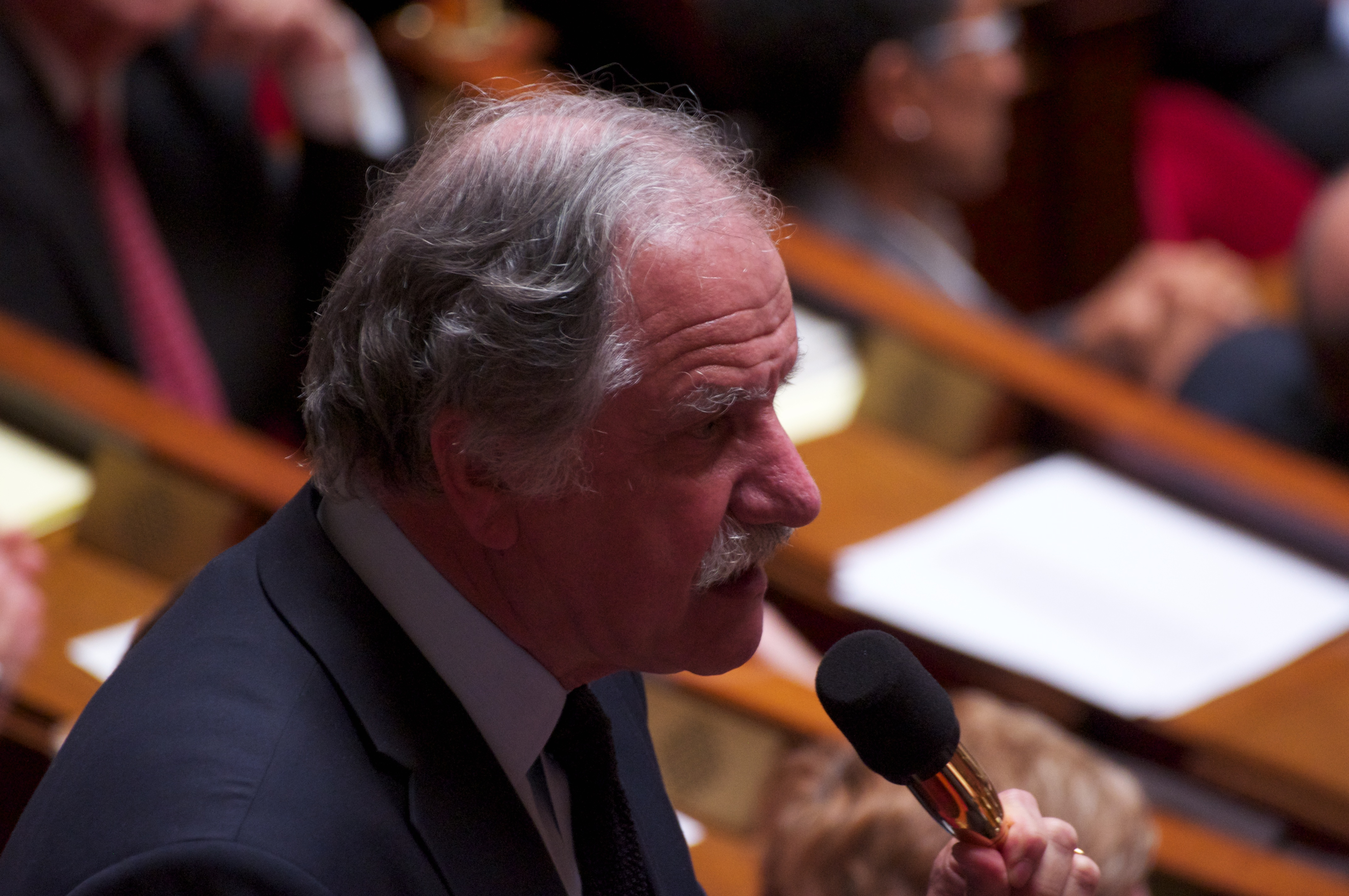 Intervention de Noël Mamère au vote solennel de la loi ouvrant le mariage aux couples de personnes de même sexe - Assemblée nationale